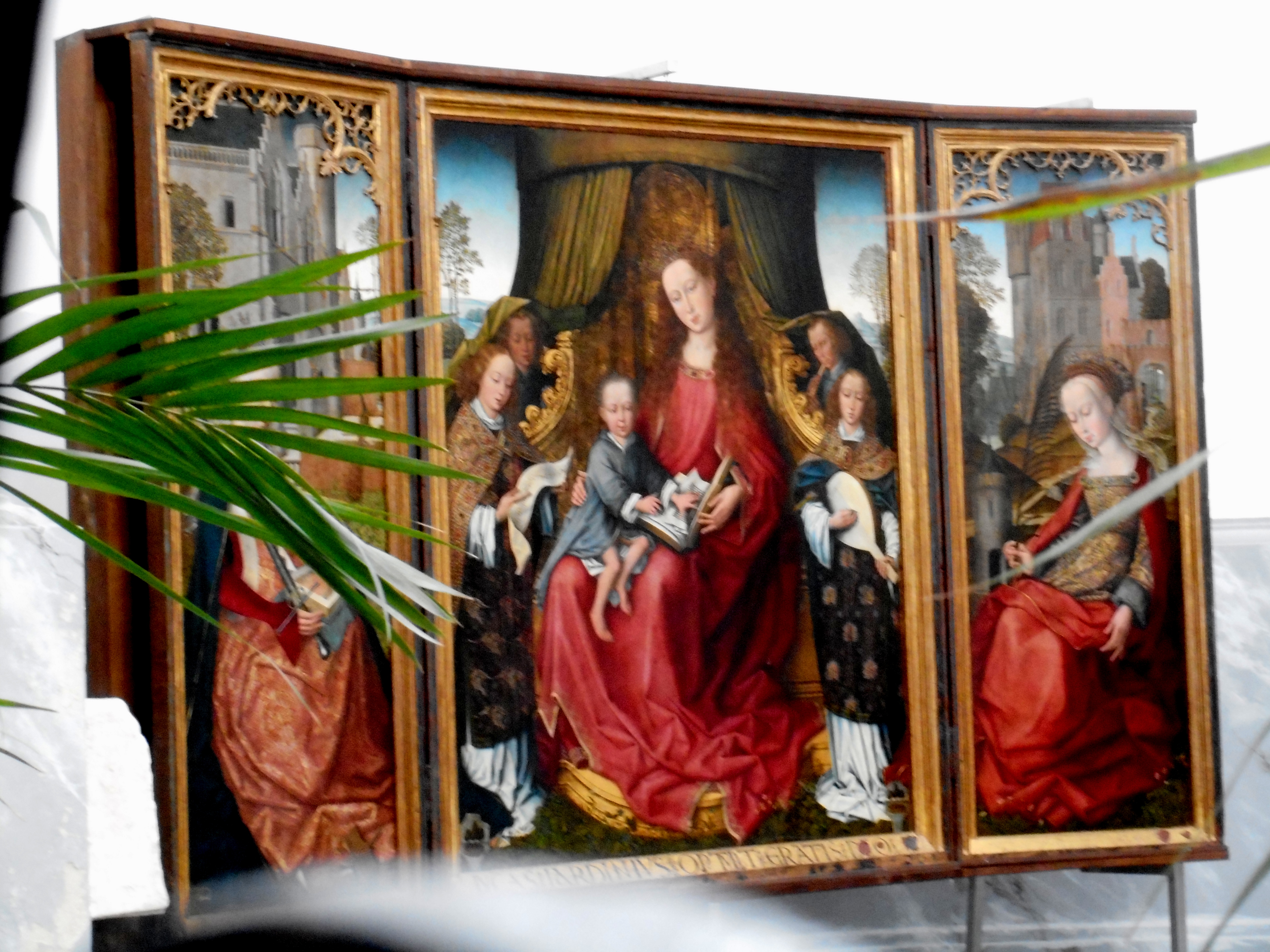 Trittico della Visitazione di Rogier van der Weyden nella chiesa di Santa Maria Assunta di Polizzi Generosa